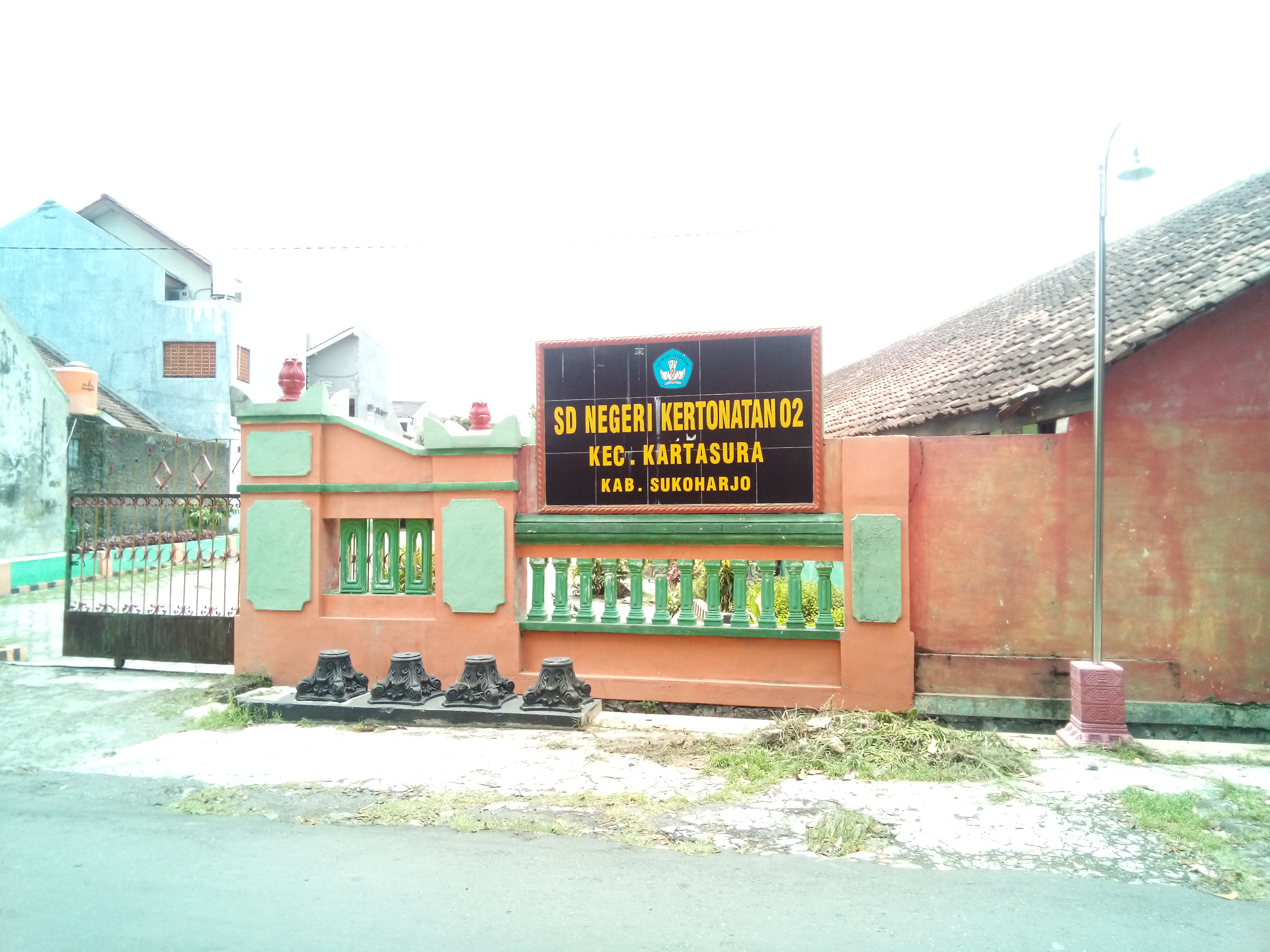 Jawa: SDN 2 Kertonatan, minangka sekolah dhasar sing mapan ing kecamatan Kartasura, kabupatén Sukoharjo